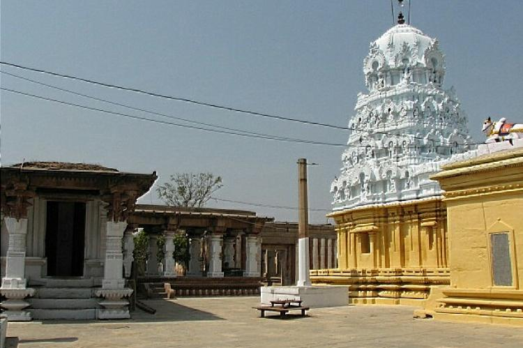 கோயில் அமைப்பு